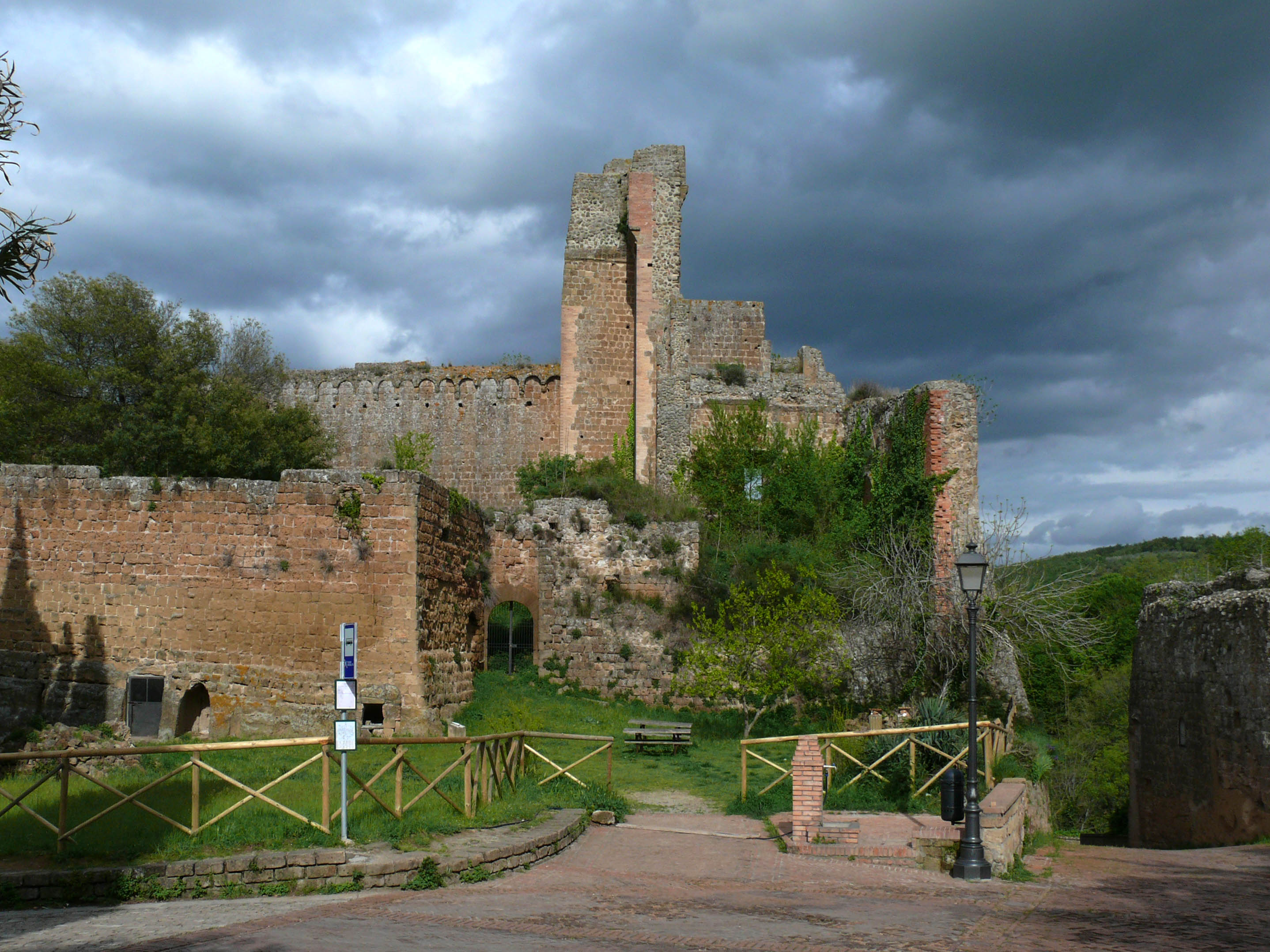 Sovana, Rocca Aldobrandesca